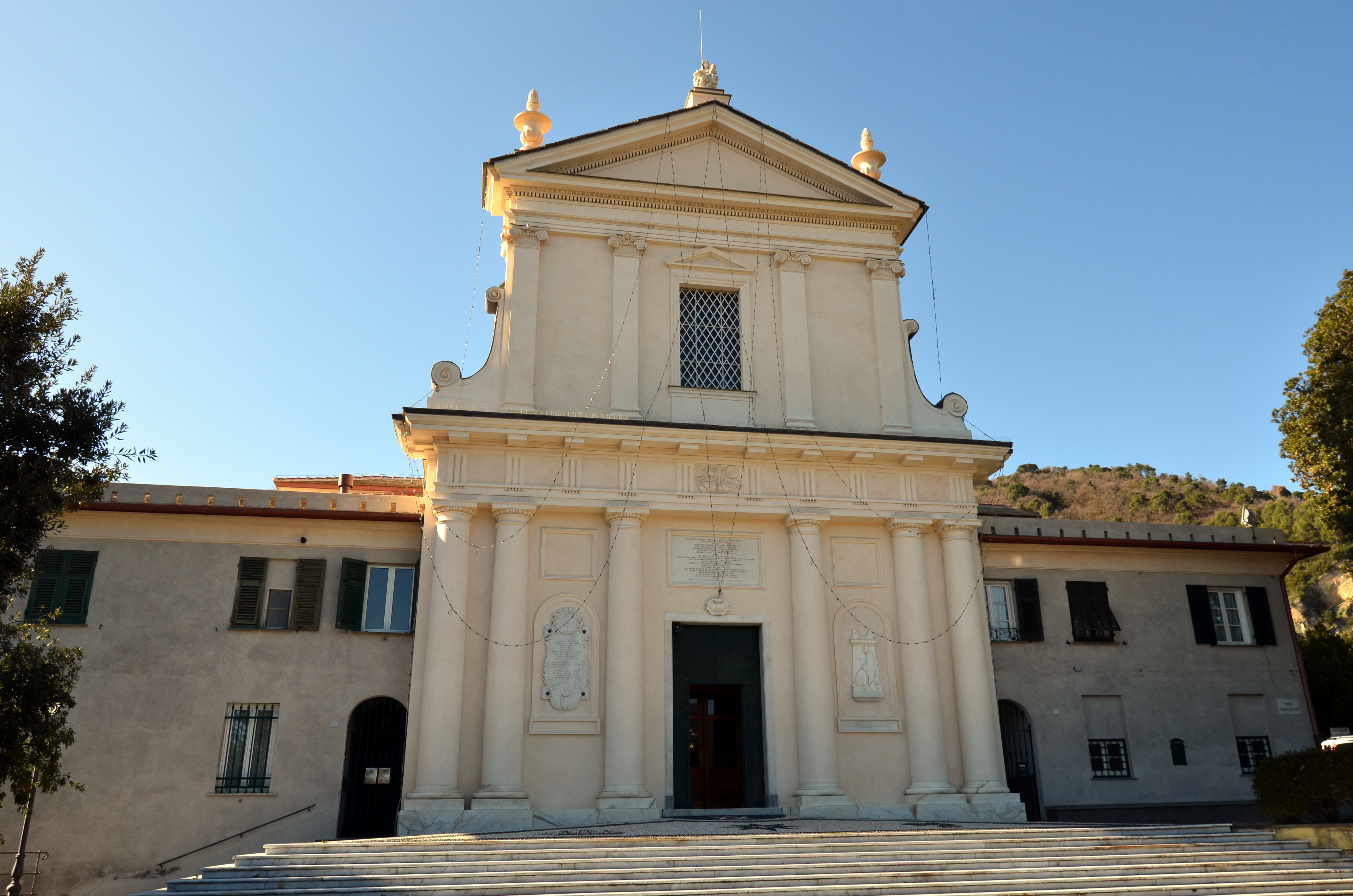 Santuario della Madonna dell'Olivo, Chiavari, Liguria, Italia